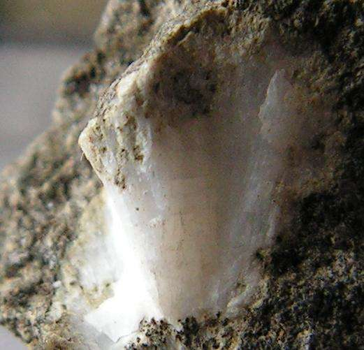 Garronit,_Galboly,_Garron_Escarpment,_Antrim_Co.,_Irlandia_Pn; autor zdjęcia Paleonet; 10.12.2006 r.